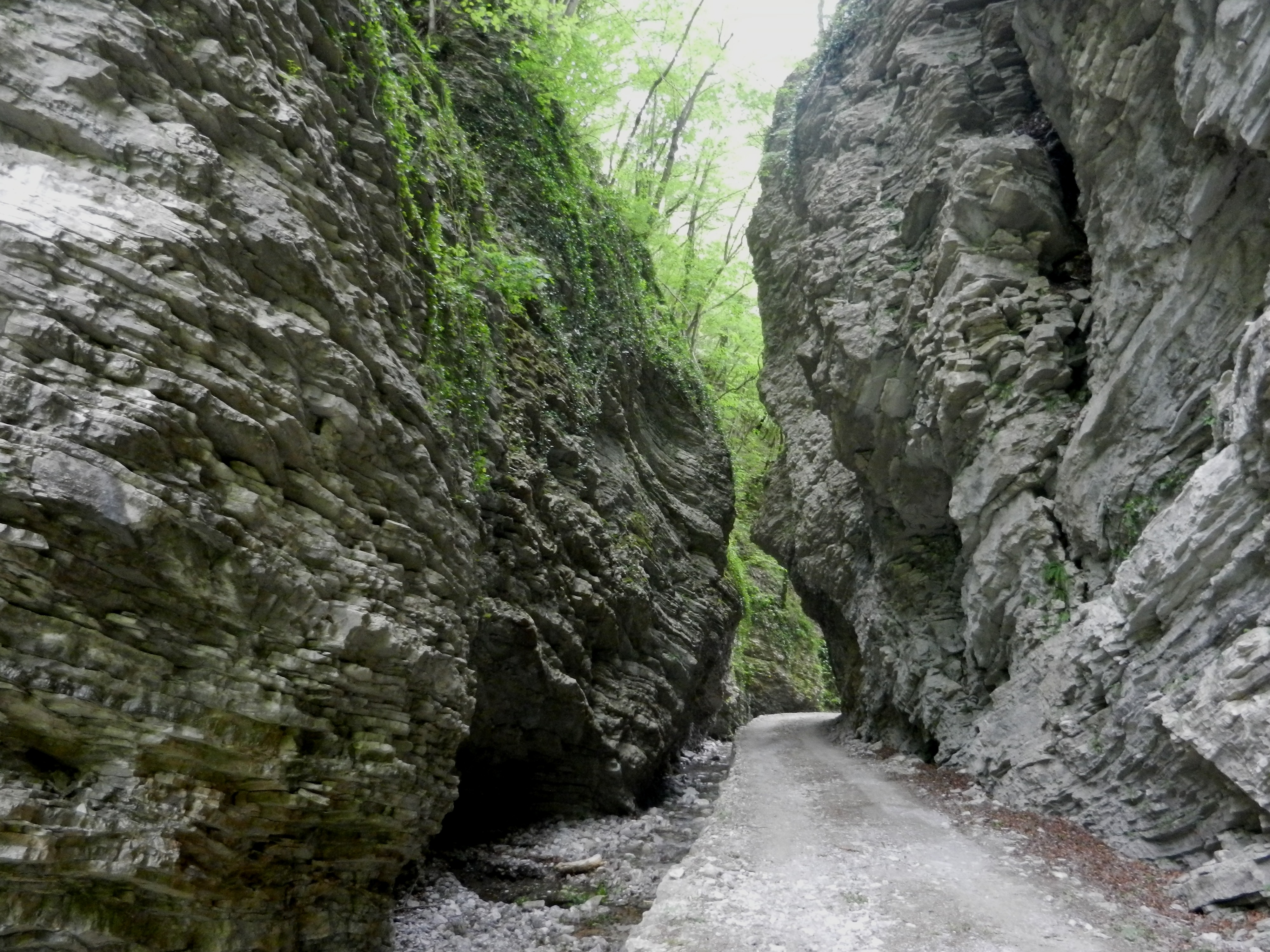 Soteska Driselpoh, Baška Grapa.